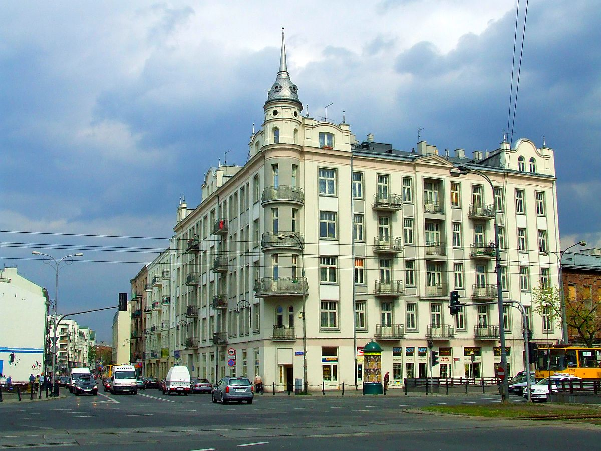 Ulica Ząbkowska w Warszawie